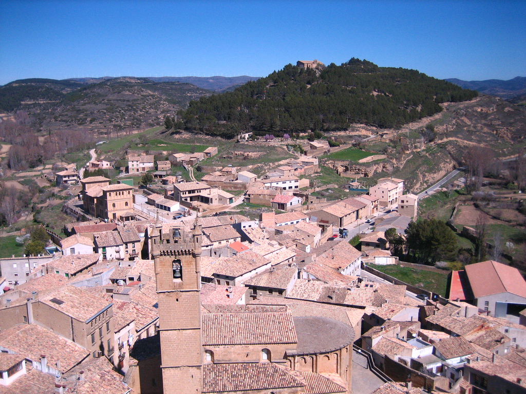 Aragonés: Ambista d'Uncastiello (Zinco Billas, Zaragoza, Aragón)